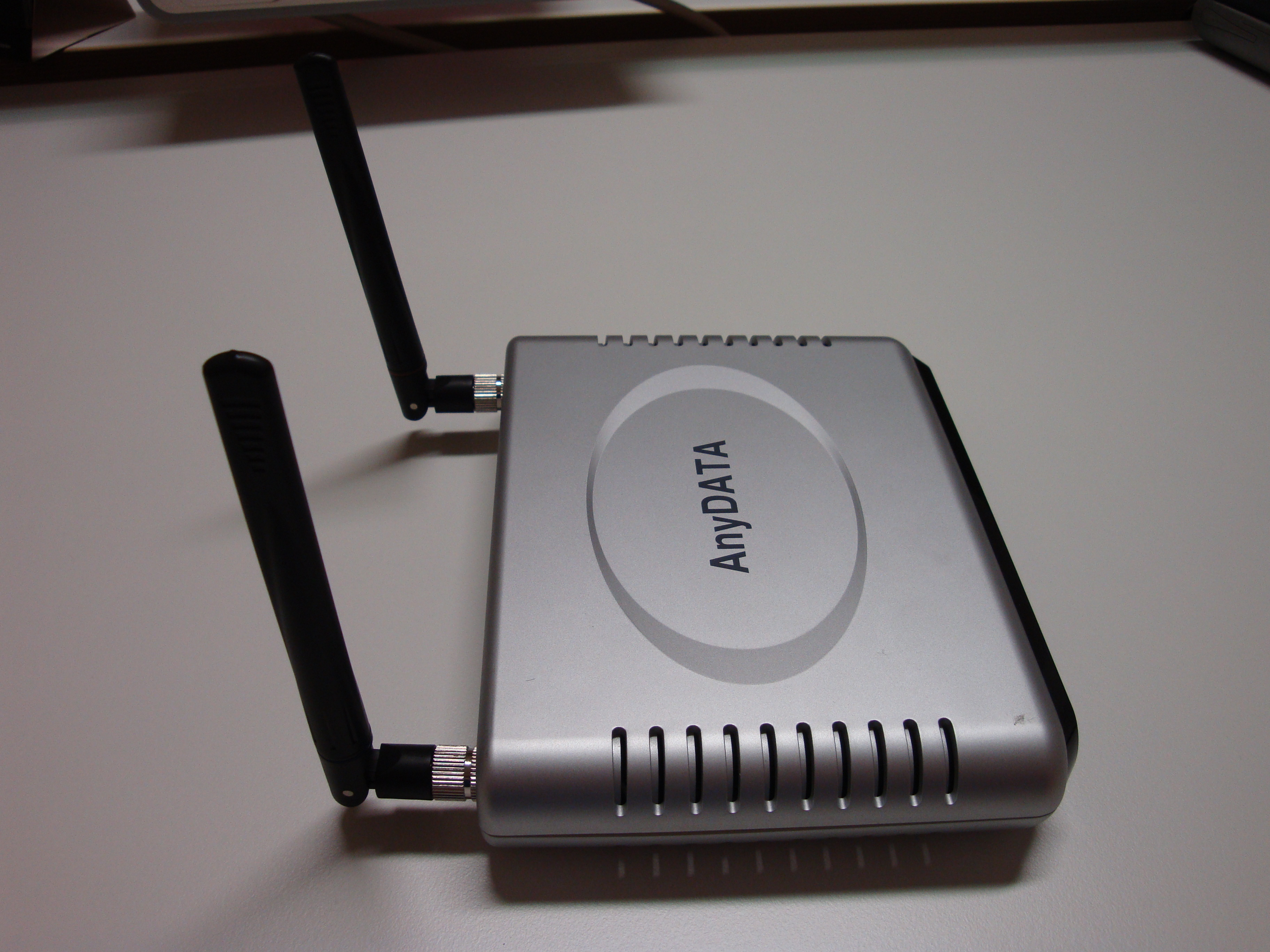 HSDPA cellular router, made di Anydata, a korean industry